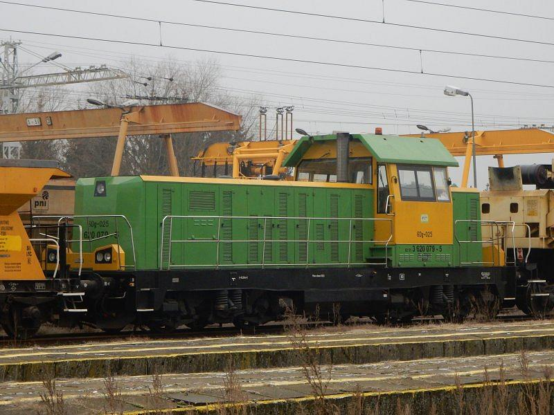 Spalinowóz 6Dg-025 stoi na stacji Łowicz Przedmieście.